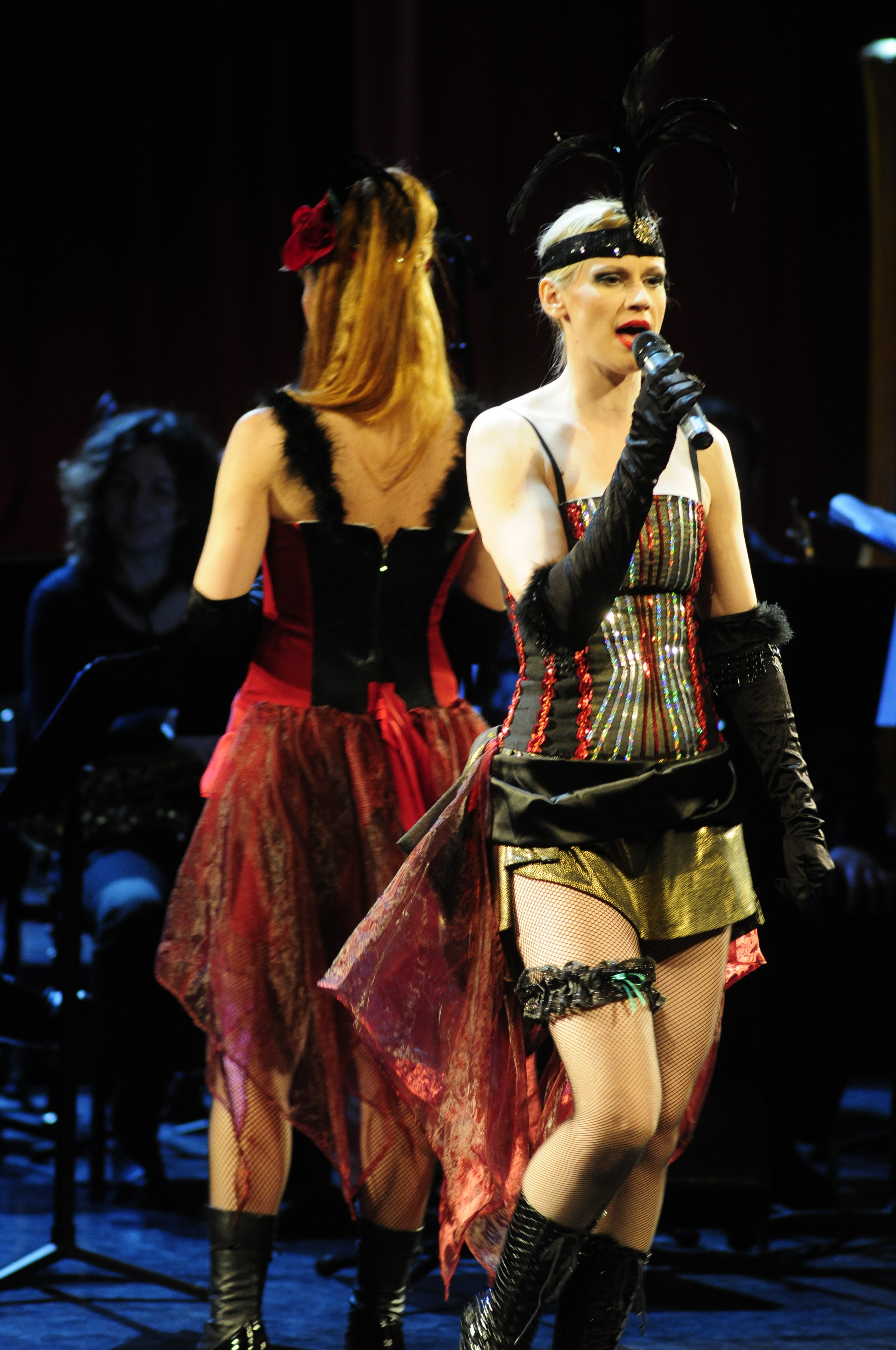 Predstava "Pod sjajem zvezda"